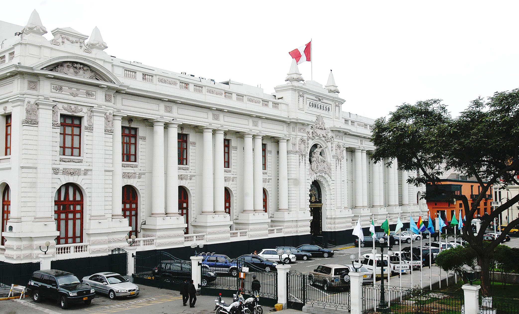 Las modificaciones propuestas a la Ley de Partidos Políticos verán hoy viernes en el respectivo Grupo de Trabajo de la Comisión de Constitución, con la presencia de la jefa de la Oficina Nacional de Procesos Electorales (ONPE). Será a las 09:00 horas en la Sala N° 4.